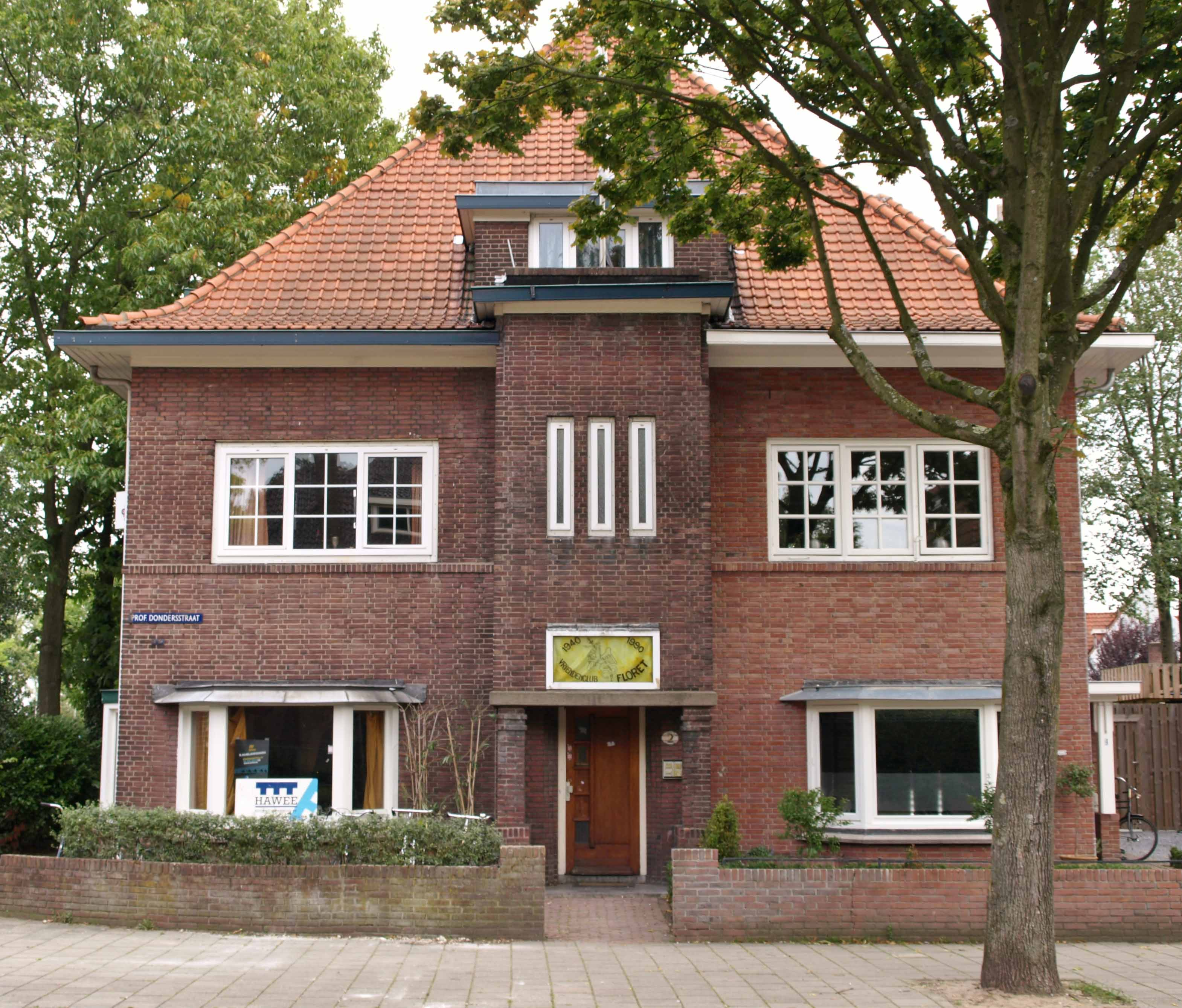 Prof.Dondersstraat 2 Tilburg Architect Ide Bloem